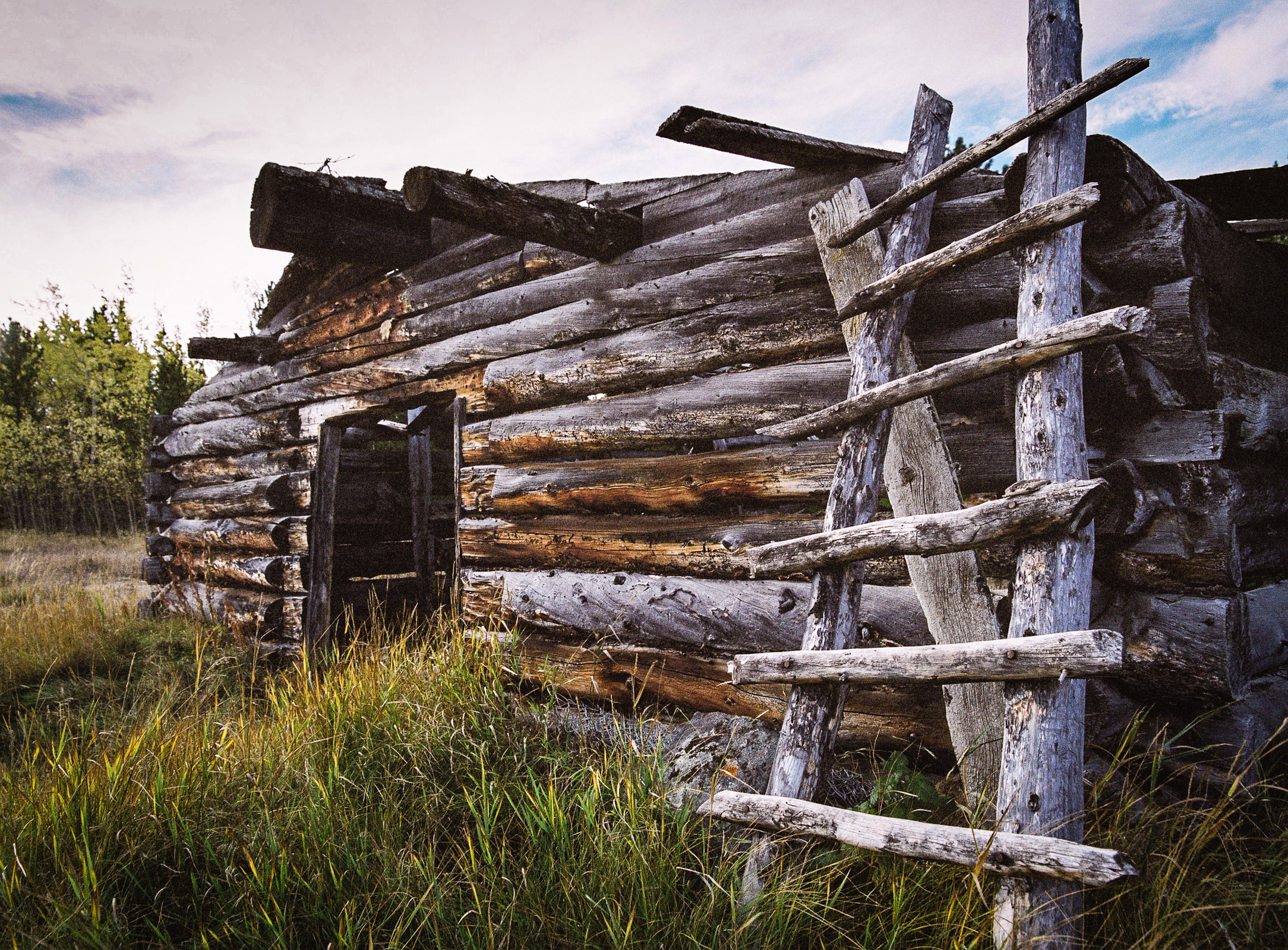 Ektacolor Pro exp. 10/1999